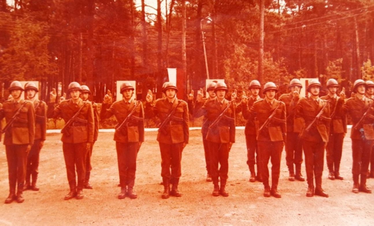 Garnizon Drawno. Przysięga wojskowa